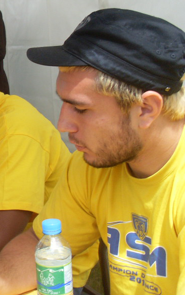 Le rugbyman français Ludovic Radosavljevic lors de la présentation du bouclier de Brennus au siège du groupe Michelin à Clermont-Ferrand, trois jours après que l'ASM Clermont Auvergne a remporté le championnat de France.